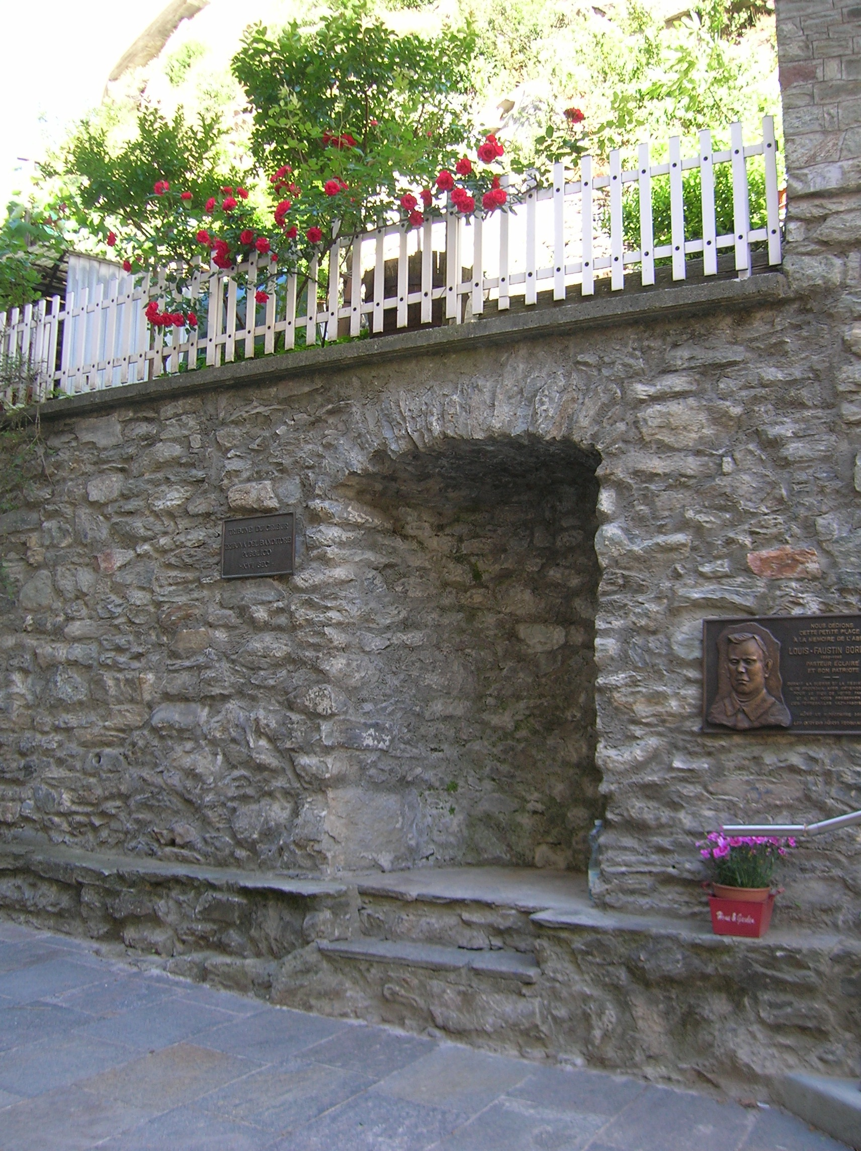 tribuna del banditore pubblico del XVI secolo. Hône, Valle d'Aosta, Italia.